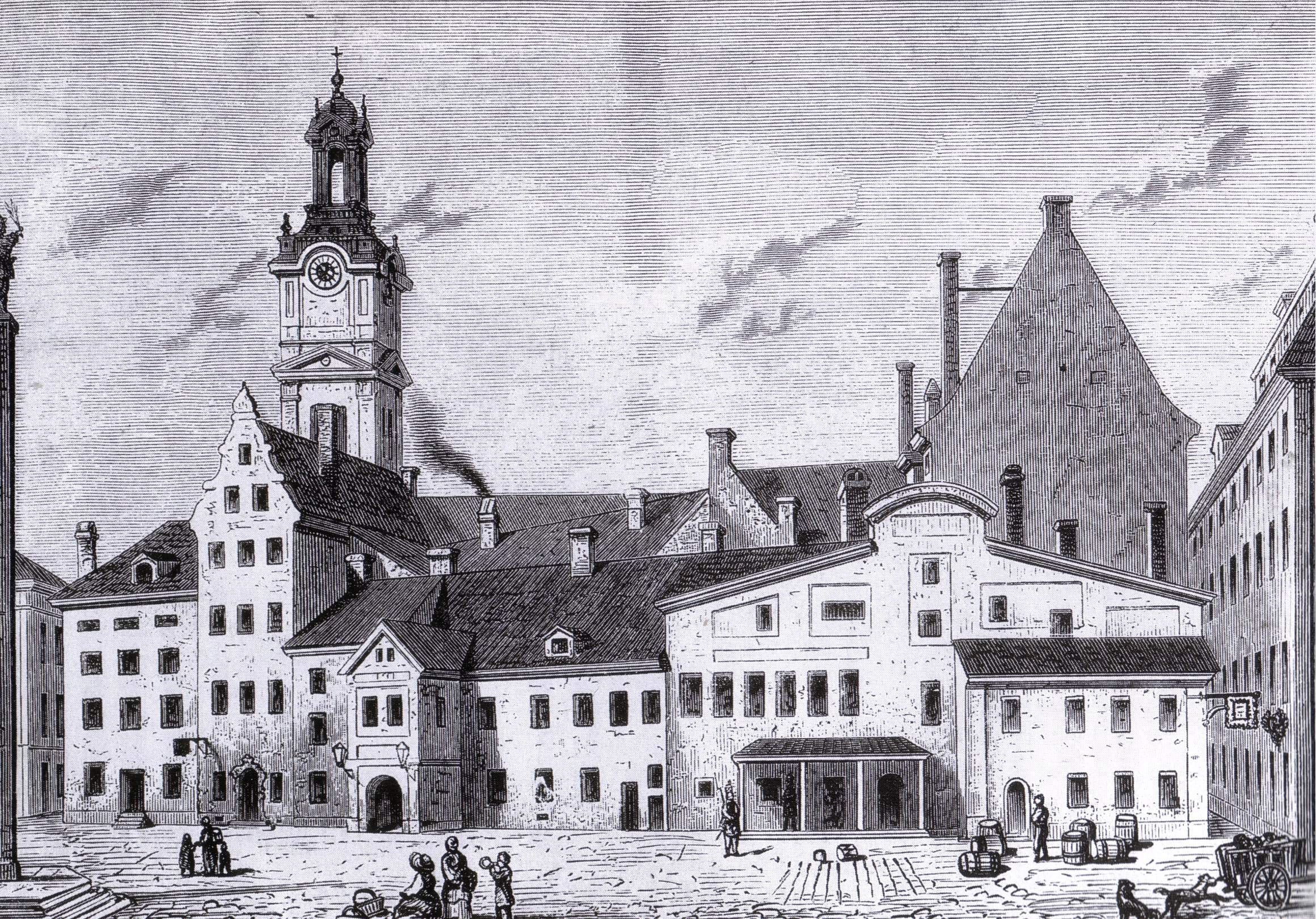 Drawing of Stortorget in Gamla stan, Stockholm. Drawn in 1768 by Erik Palmstedt.